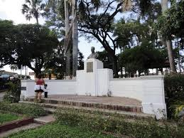 Monumento a Francisco Meléndez – Ahuachapán El Salvador